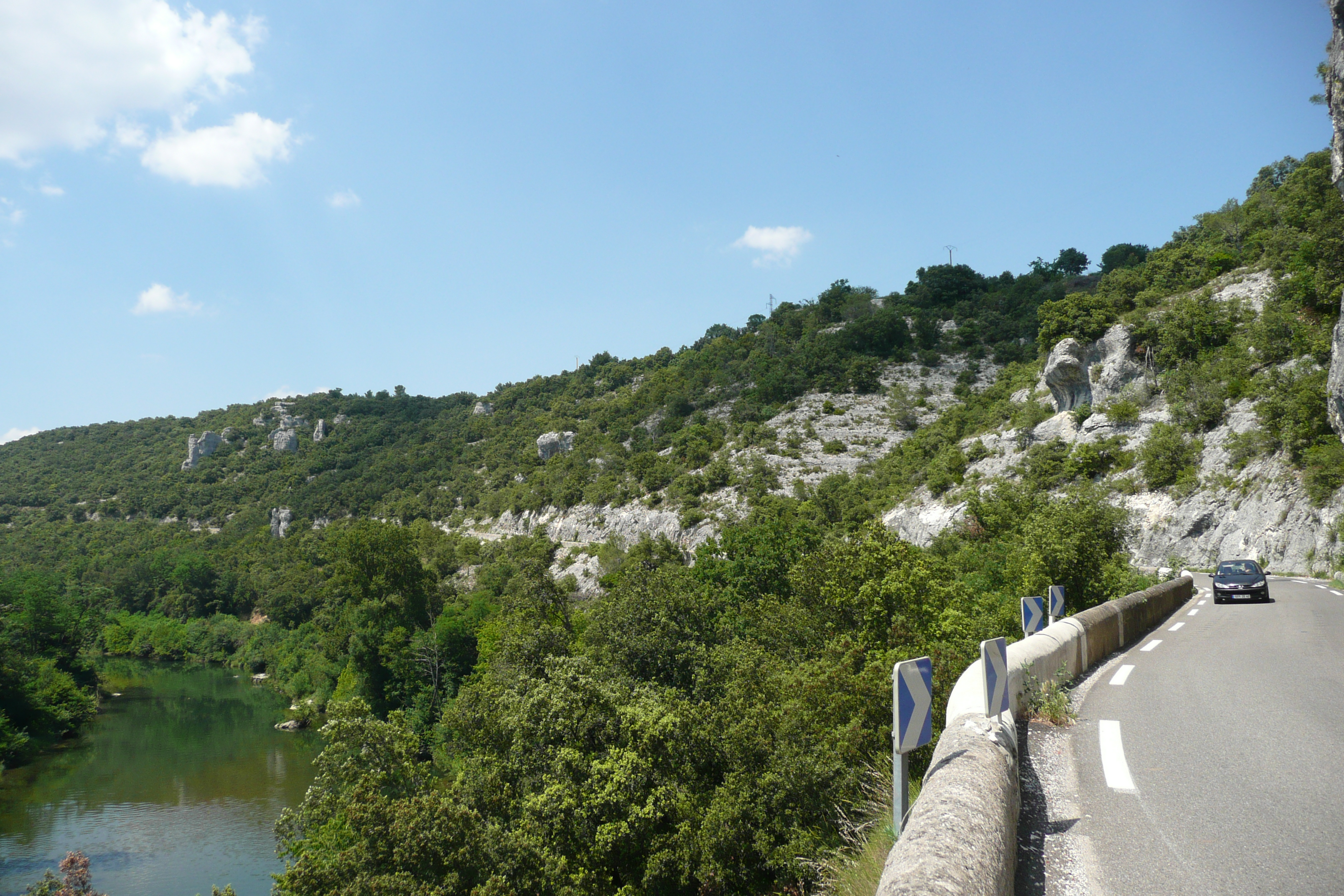 Les gorges de la Cèze près de Montclus (Gard).